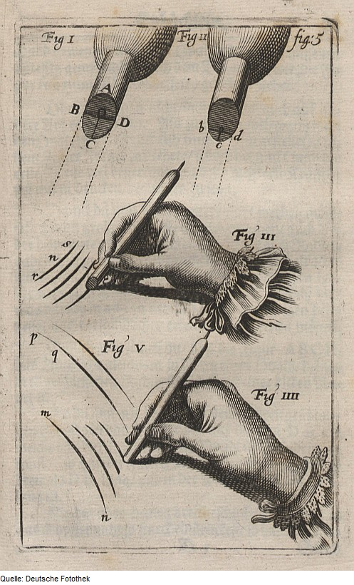 Original image description from the Deutsche FotothekTiefdruckverfahren & Tiefdruck & Radierung & Radiermanier & Ätztechnik & Ätzkunst & Radiernadel